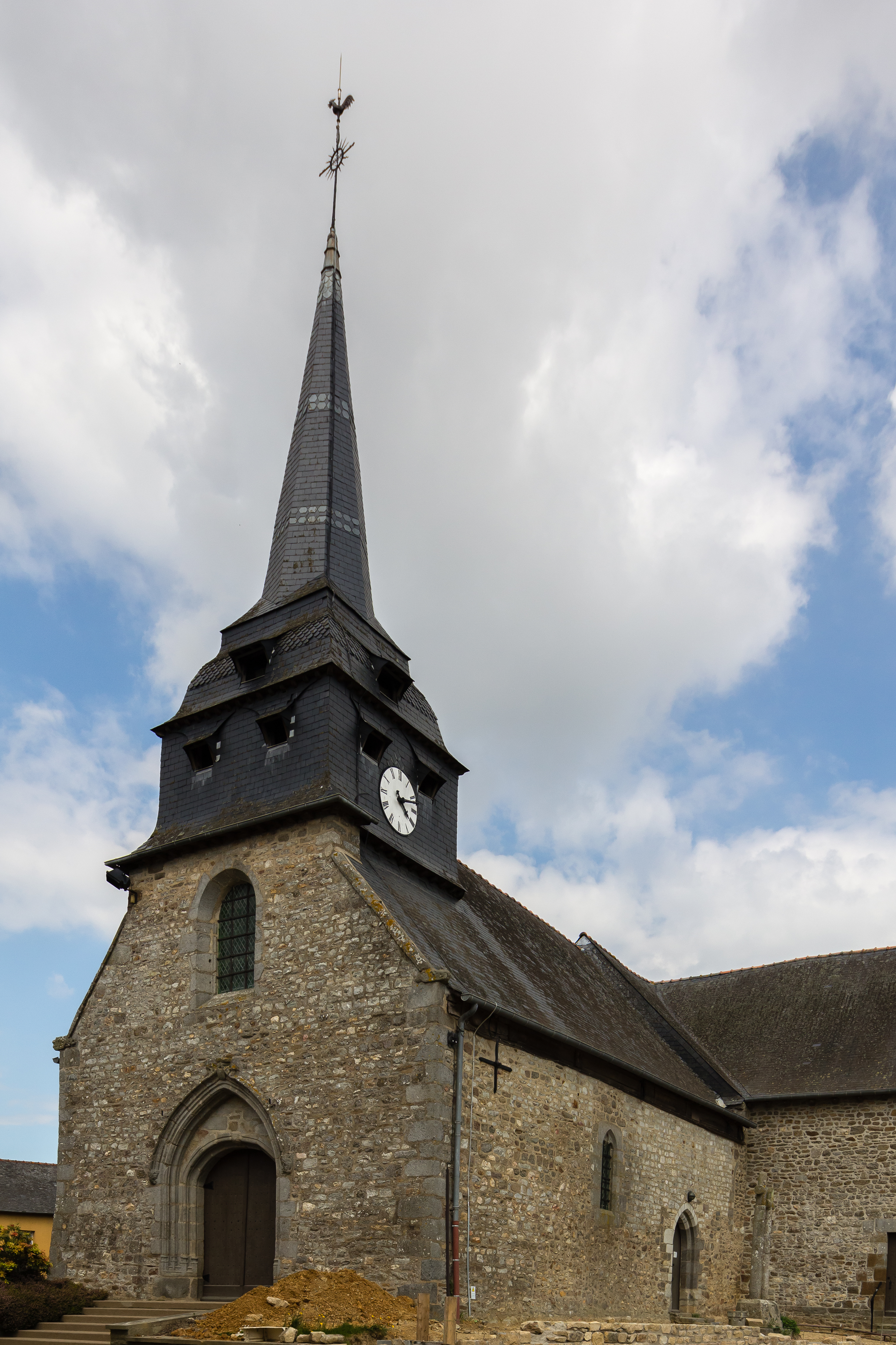 Clocher de l'église Saint-Melaine de Vignoc (France).